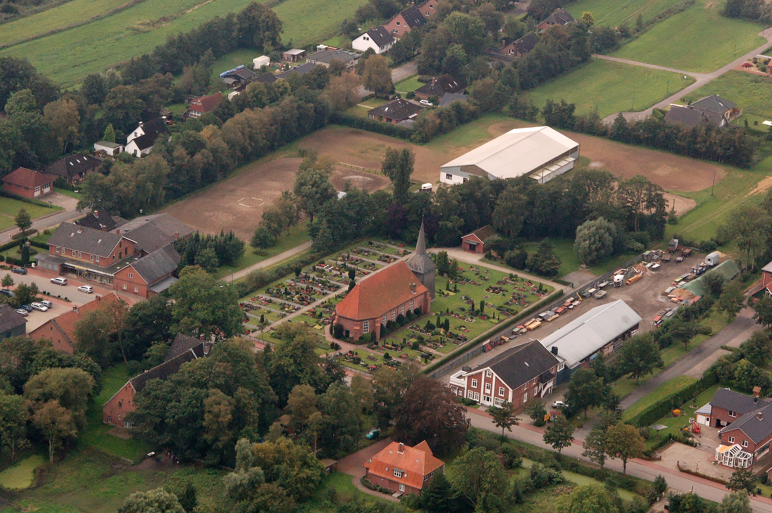 Impressionen Fotoflüge September 2011 (CPB) Dieses Foto entstand aufgrund eines Projektes, das von Wikimedia Deutschland e. V. gefördert wurde. Im Rahmen des „Community-Projektbudgets“ sollen Luftbilder u.a. von Inseln, Halligen, Sanden und Küstenstädten der deutschen Nordseeküste angefertigt werden. Das Projekt „Fotoflüge“ wurde im September 2011 begonnen.